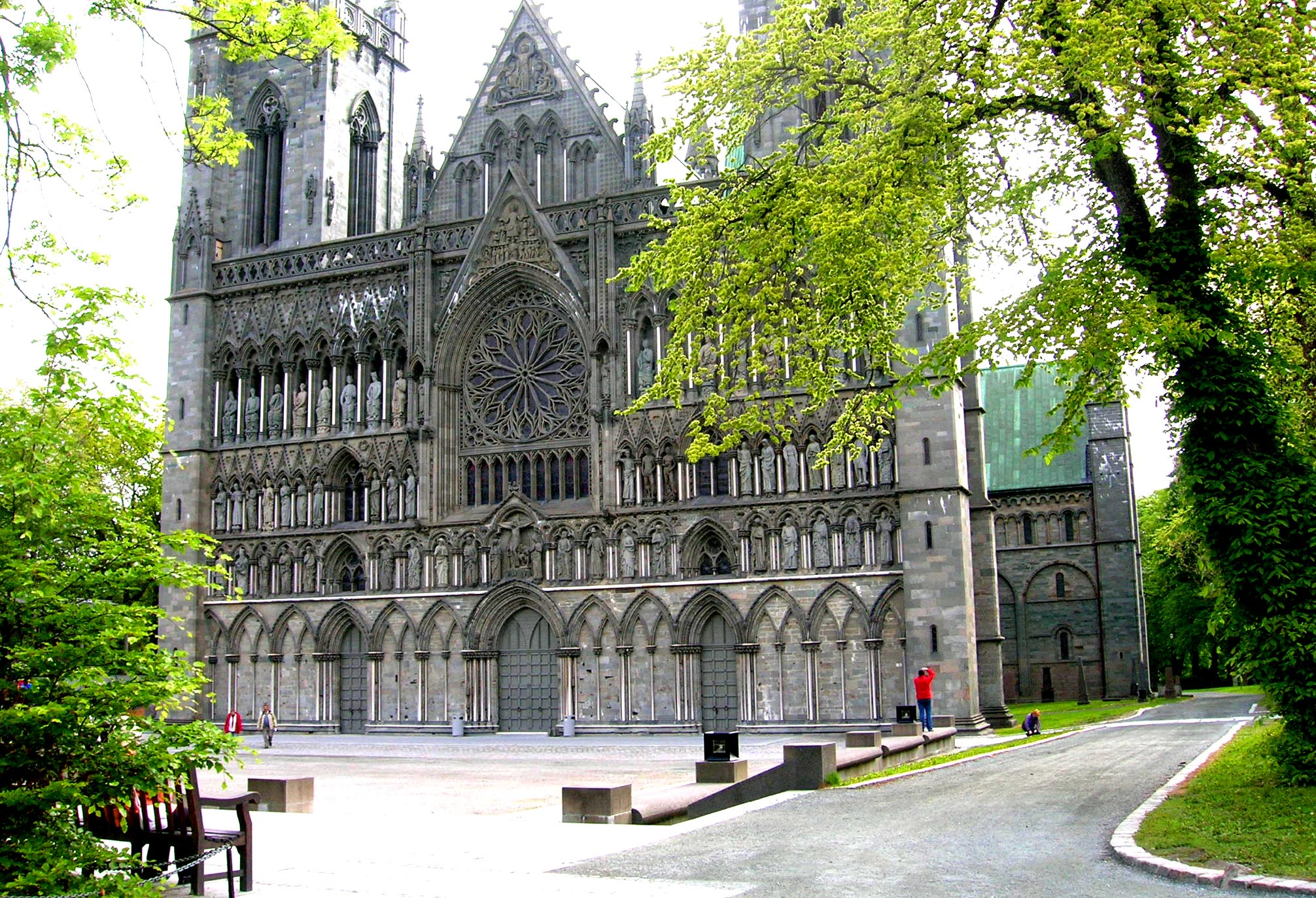 Kréinungskathedral vun Trondheim (2006)